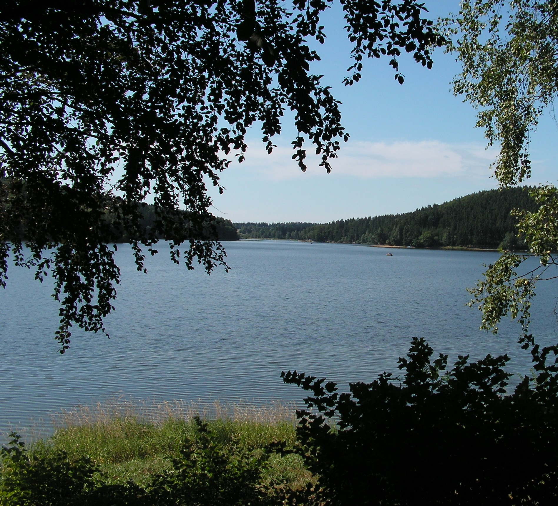 Vodní nádrž Seč v létě 2006